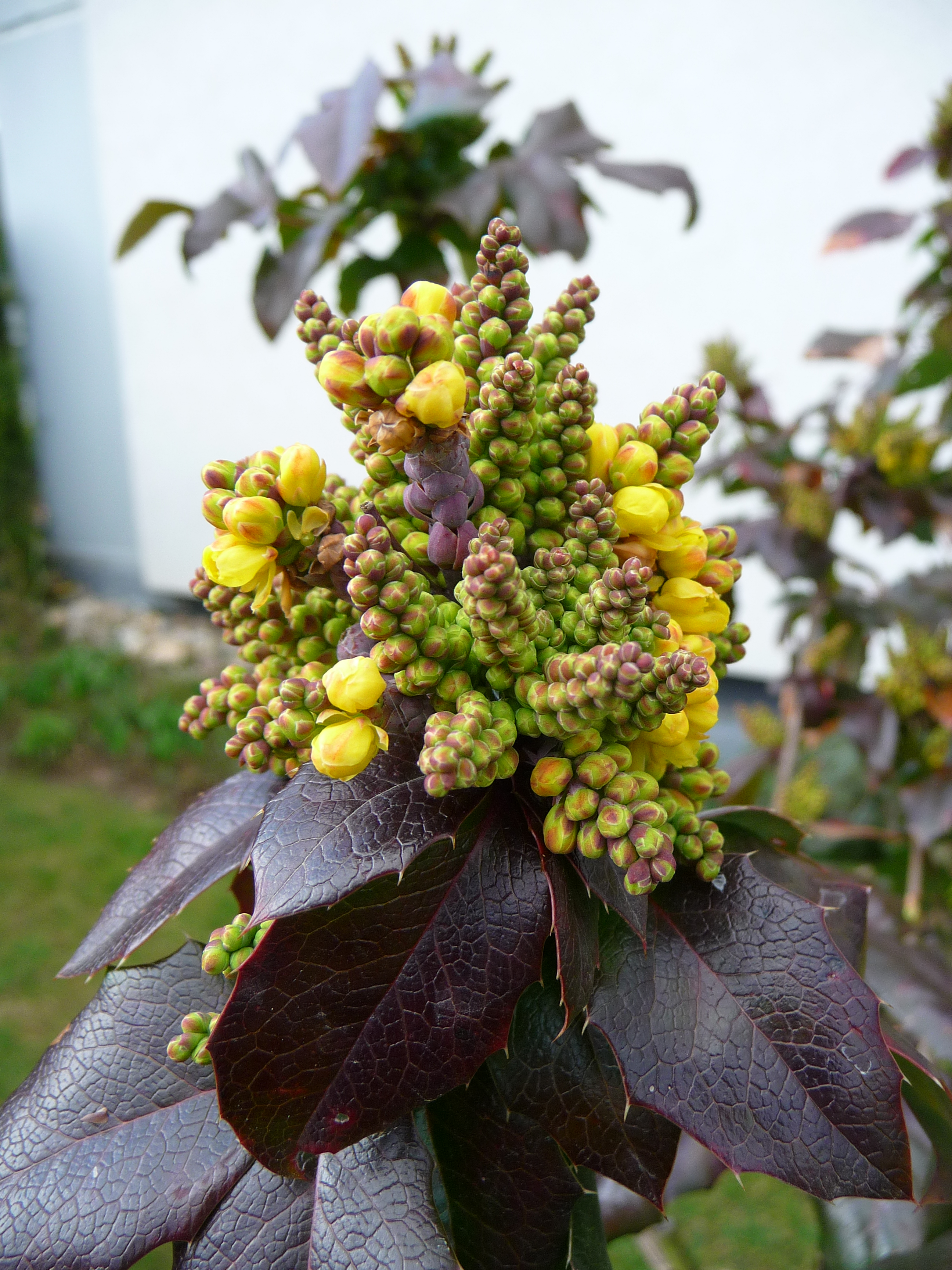 Gewöhnliche Mahonie (Mahonia aquifolium), Pflanze mit in den Abendstunden stark duftenden gelben Blüten, fotografiert in Heidelberg (Baden-Württemberg, Deutschland)